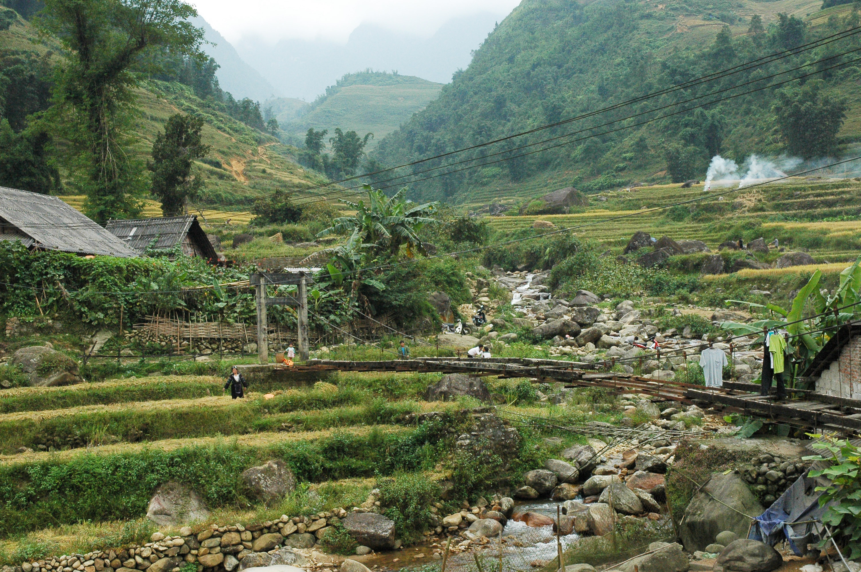 village bridge Sapa, Ta Van, Lao Chai, Vietnam